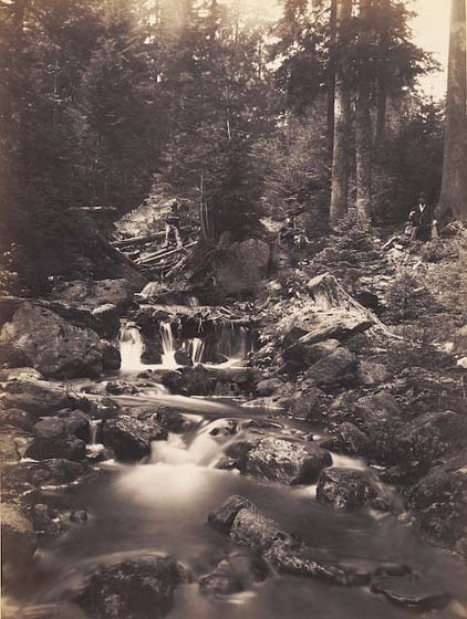 Potok u Černého jezera